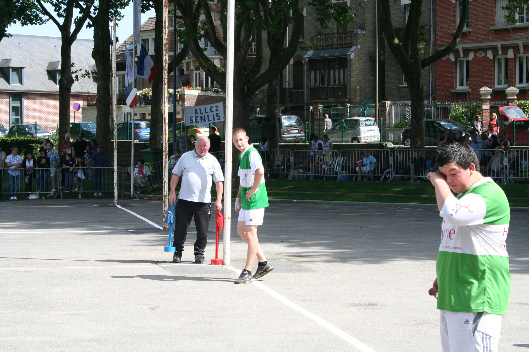 Picard: campionnat d'Franche d'balon au poing-2011 - Anmien - La Hotoée - Sonme -Franche foto parsonnèle (own work) - licence CC [ licence Creative Commons Paternité – Partage des conditions initiales à l’identique 3.0 Unported] catégorie:Balon au poing catégorie:Sport picard